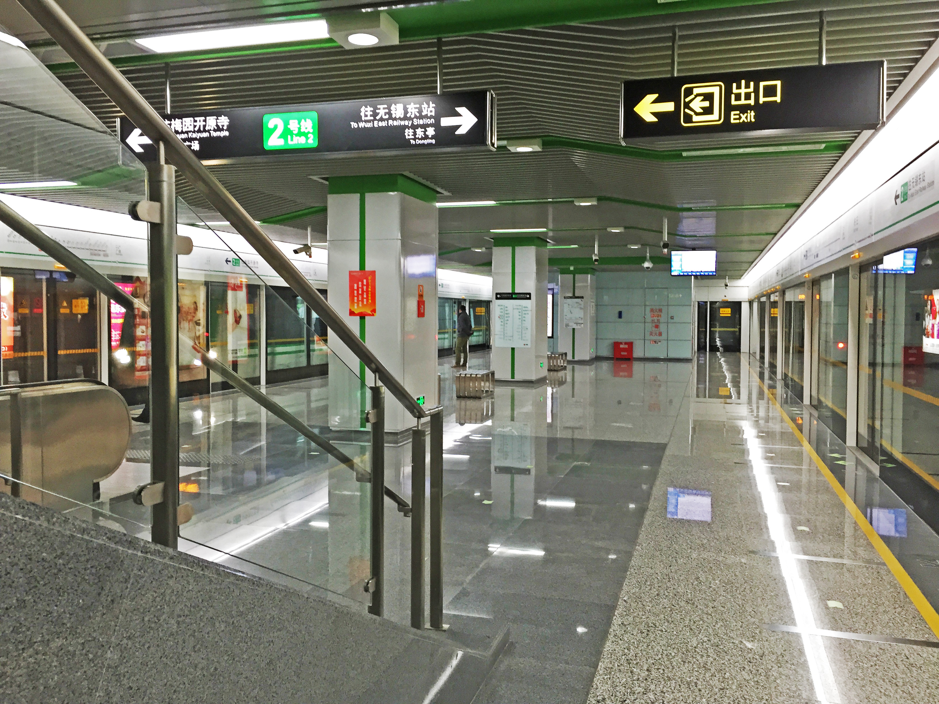 無錫地鐵2號線柏莊站站臺